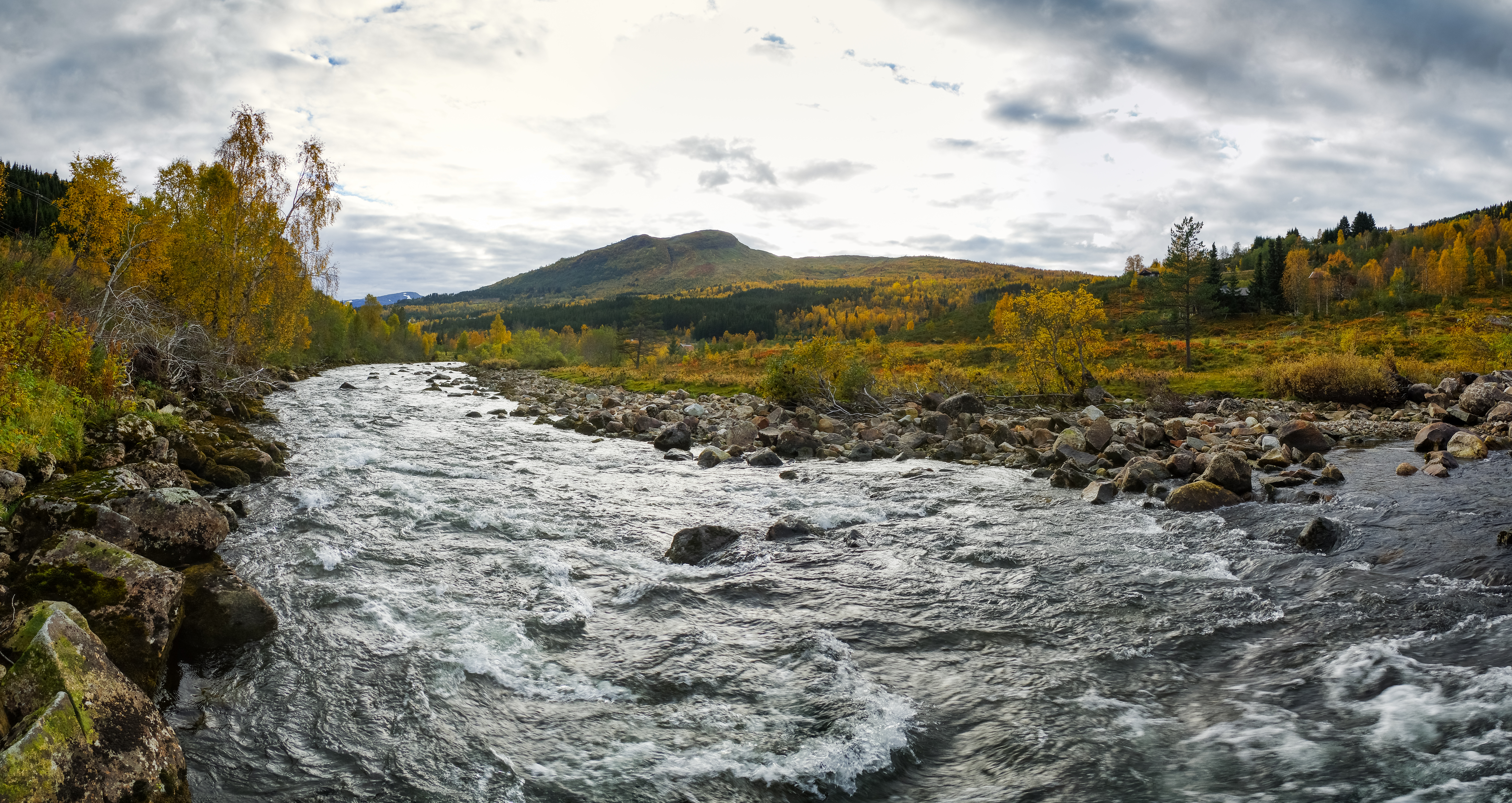 Sogndalselva i Sogndal, Noreg.